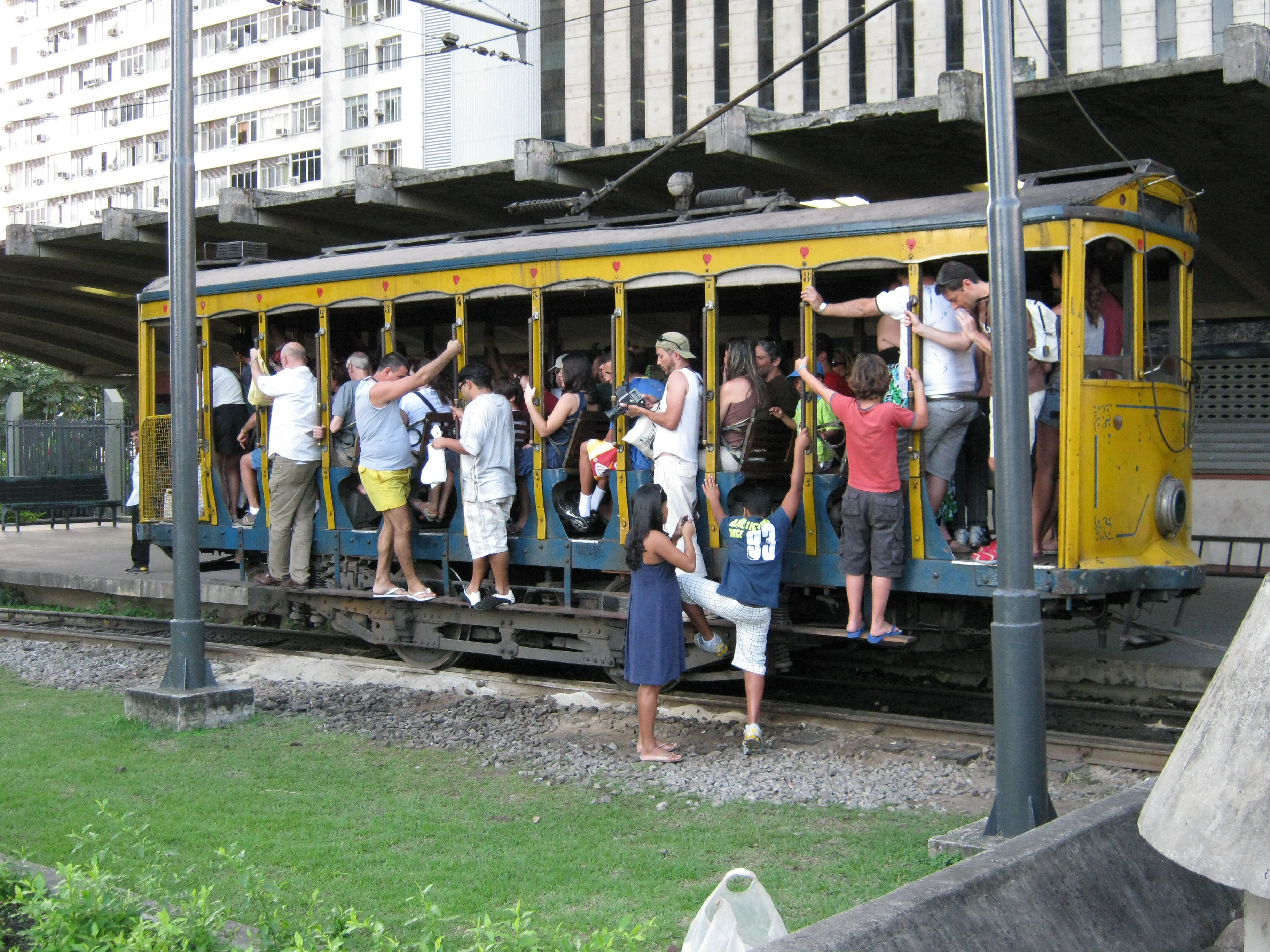 Bondinho de Santa Teresa na Estação Carioca